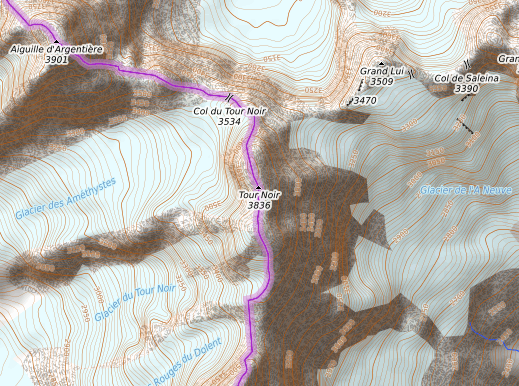 carte réalisée sur umap This map may be incomplete, and may contain errors. Don't rely solely on it for navigation.